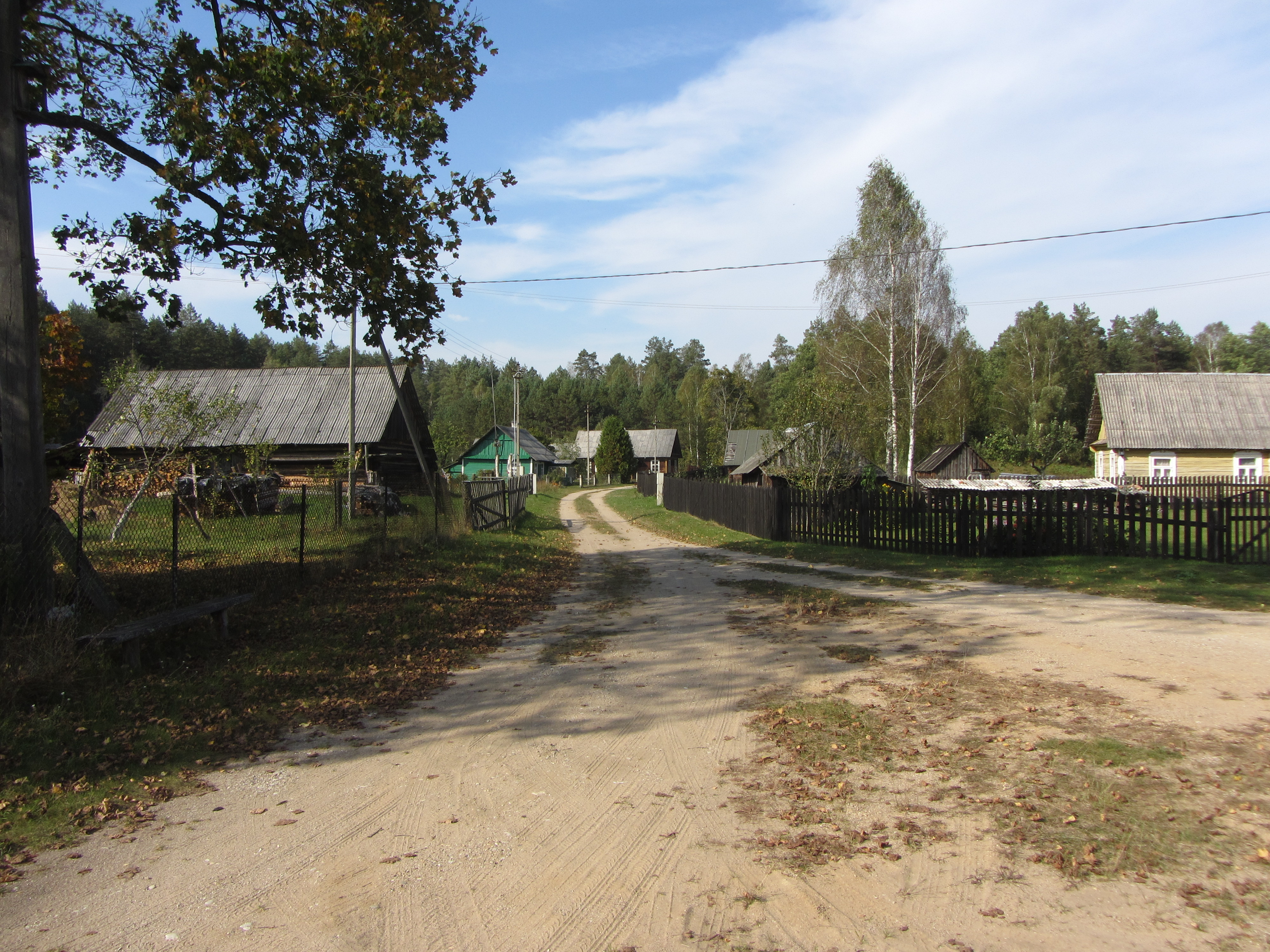 Dubininkas 65344, Lithuania